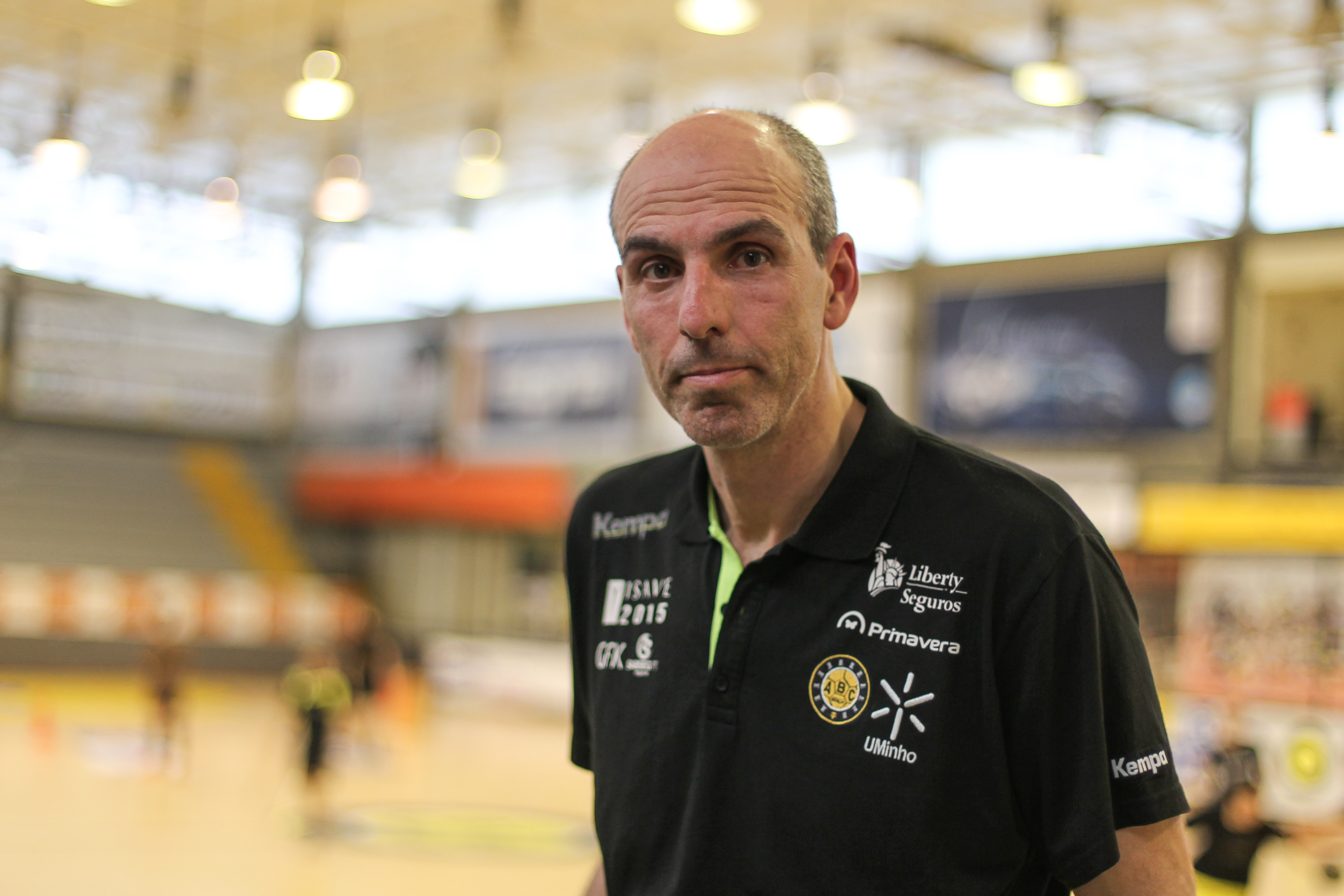 Carlos Resende - Pavilhão Flávio Sá Leite (@Minho Desportivo)